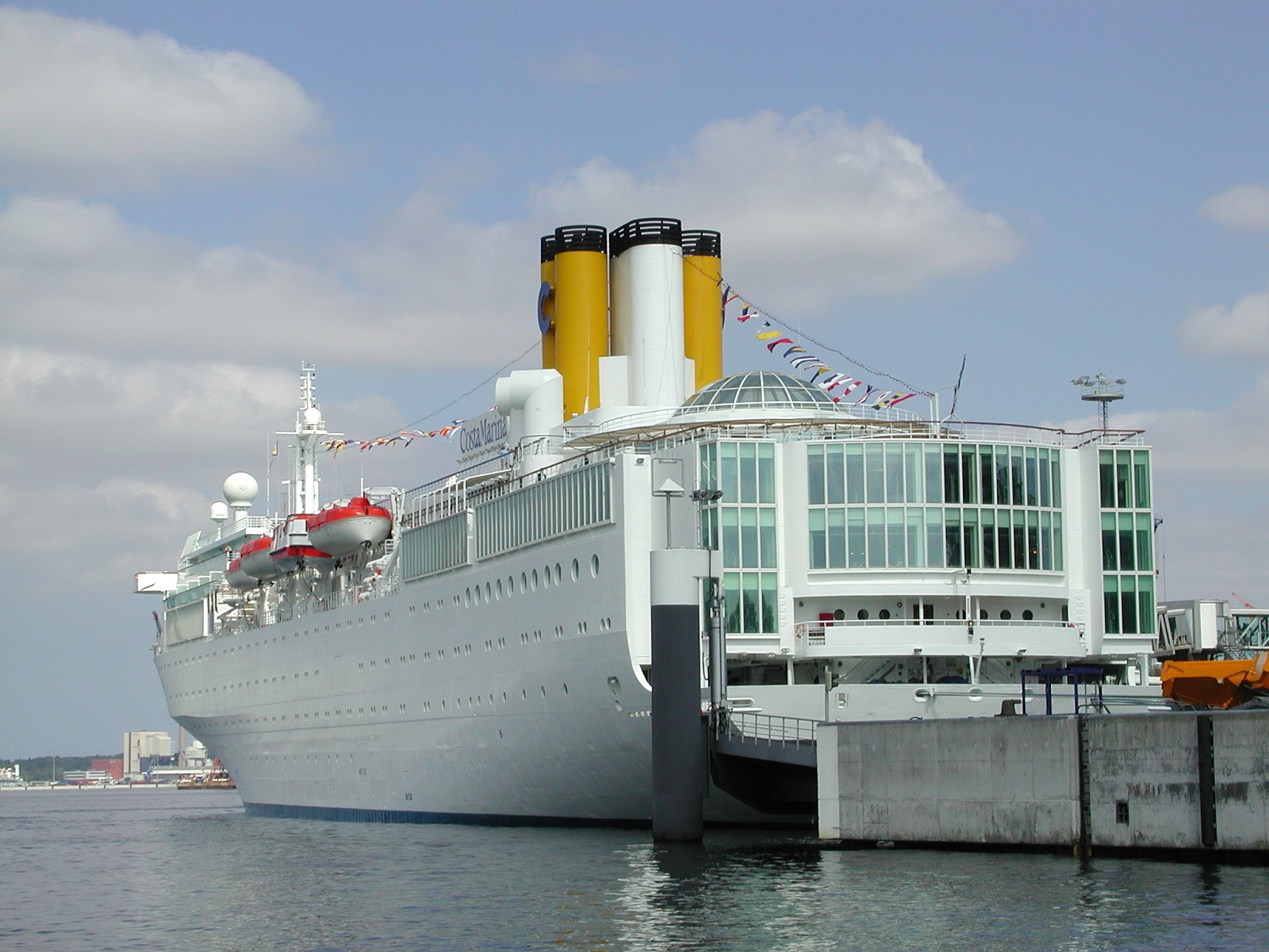 Kreuzfahrtschiff Costa Marina im Kieler Hafen (Heckansicht).